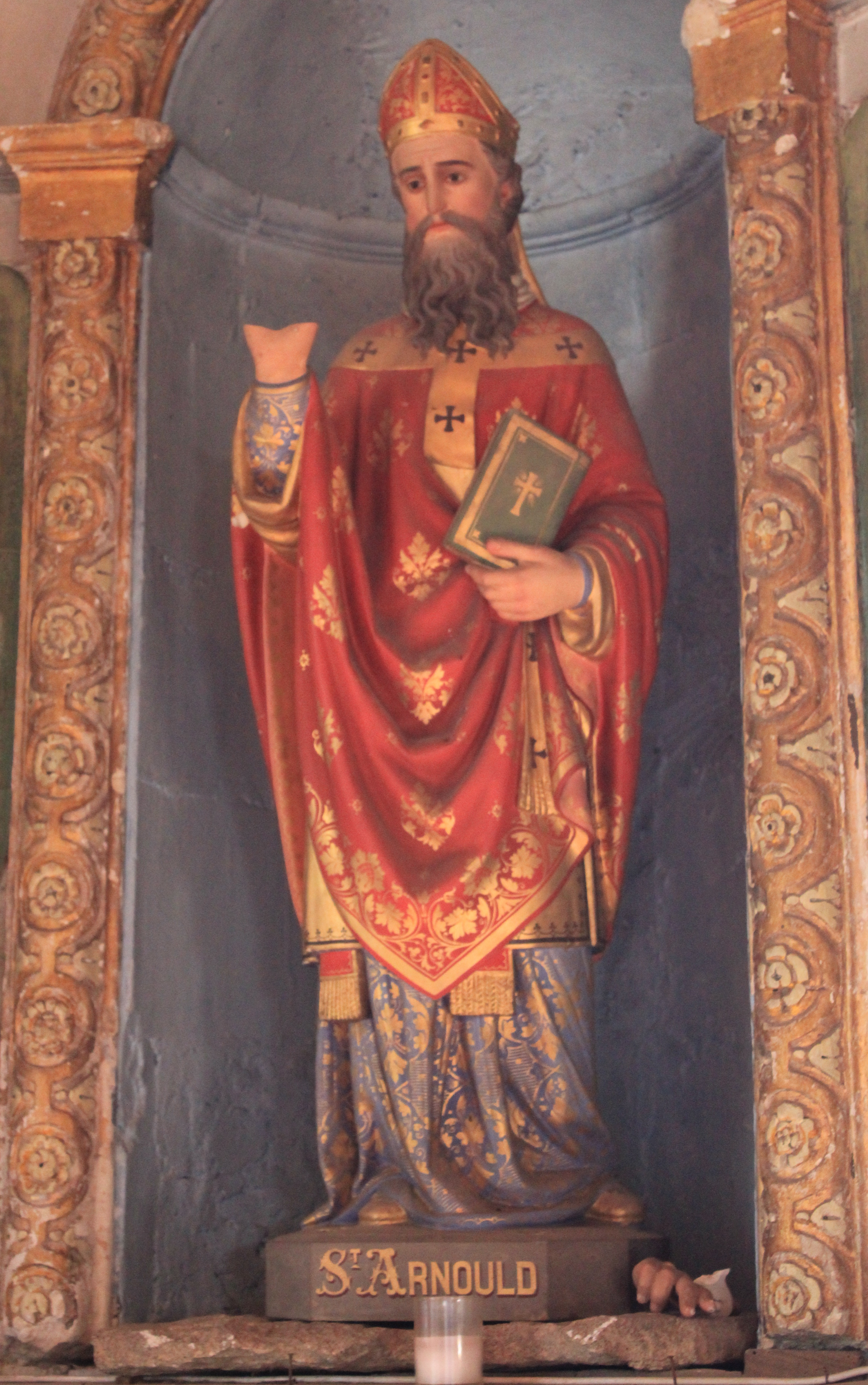 Église Saint-Arnould à Saint-Allouestre, Morbihan, France. Statue de Saint Arnould.